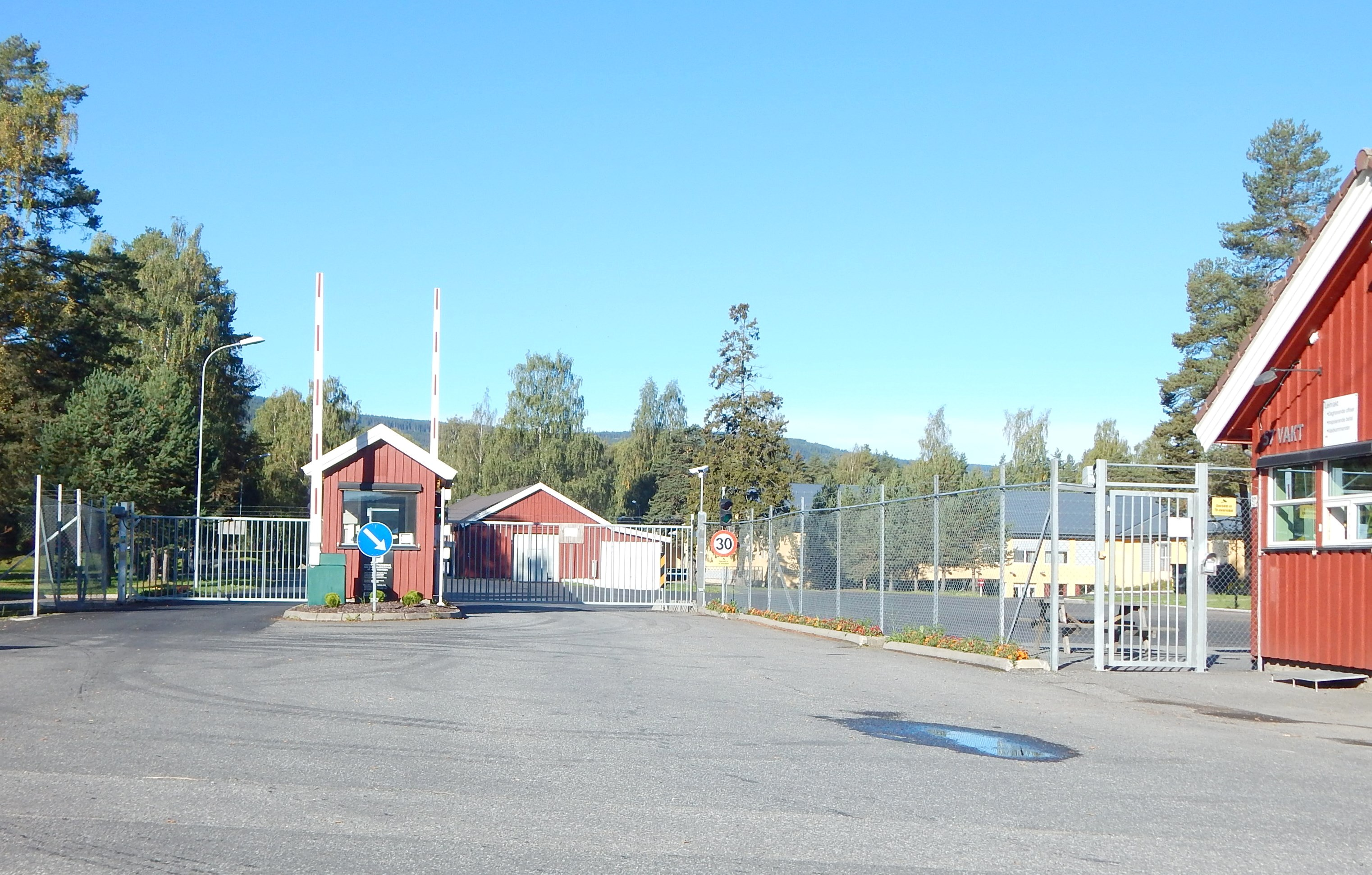 Inngangen til Jørstadmoen leir